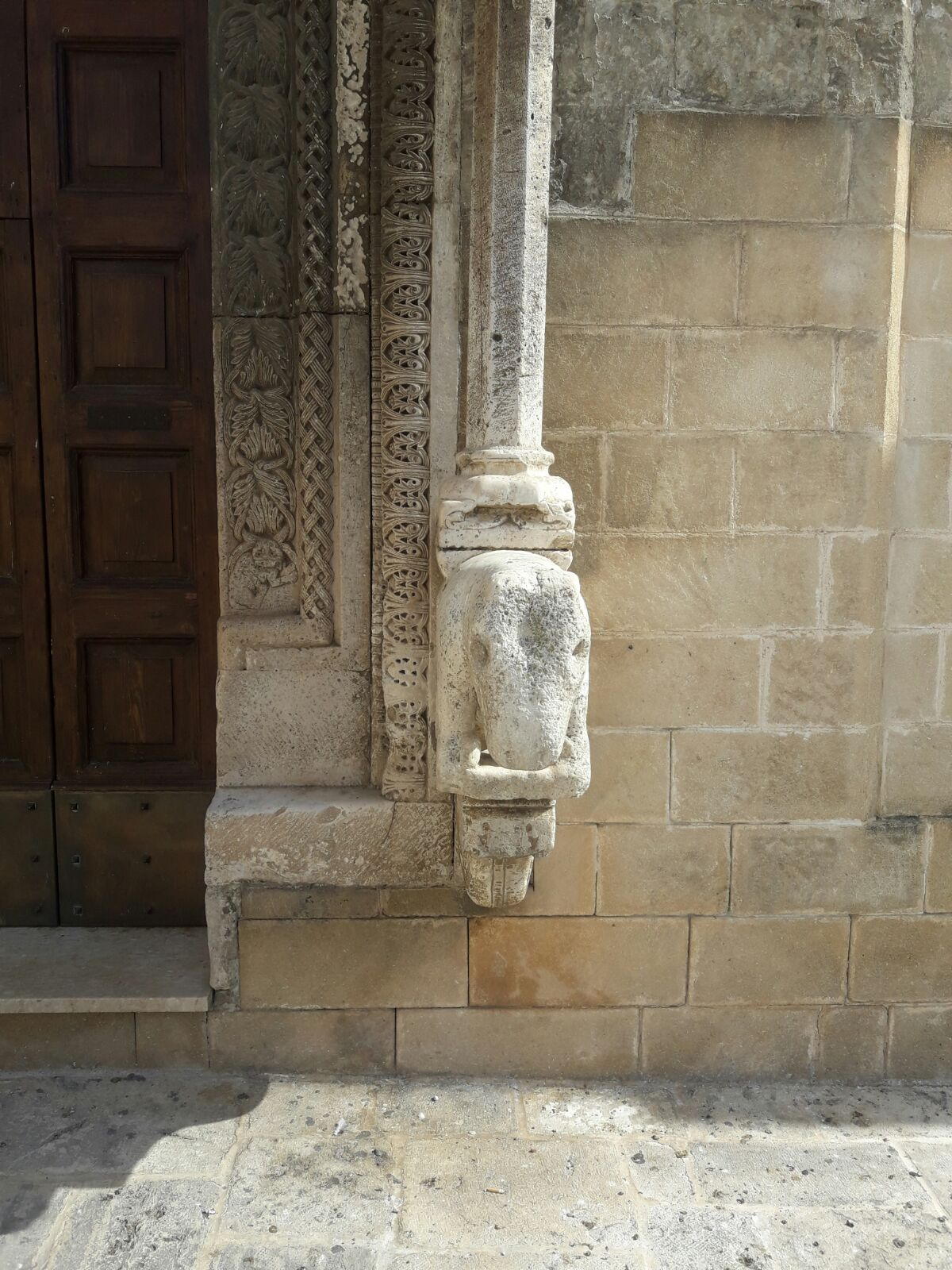 Dettaglio del portale della Chiesa Madre